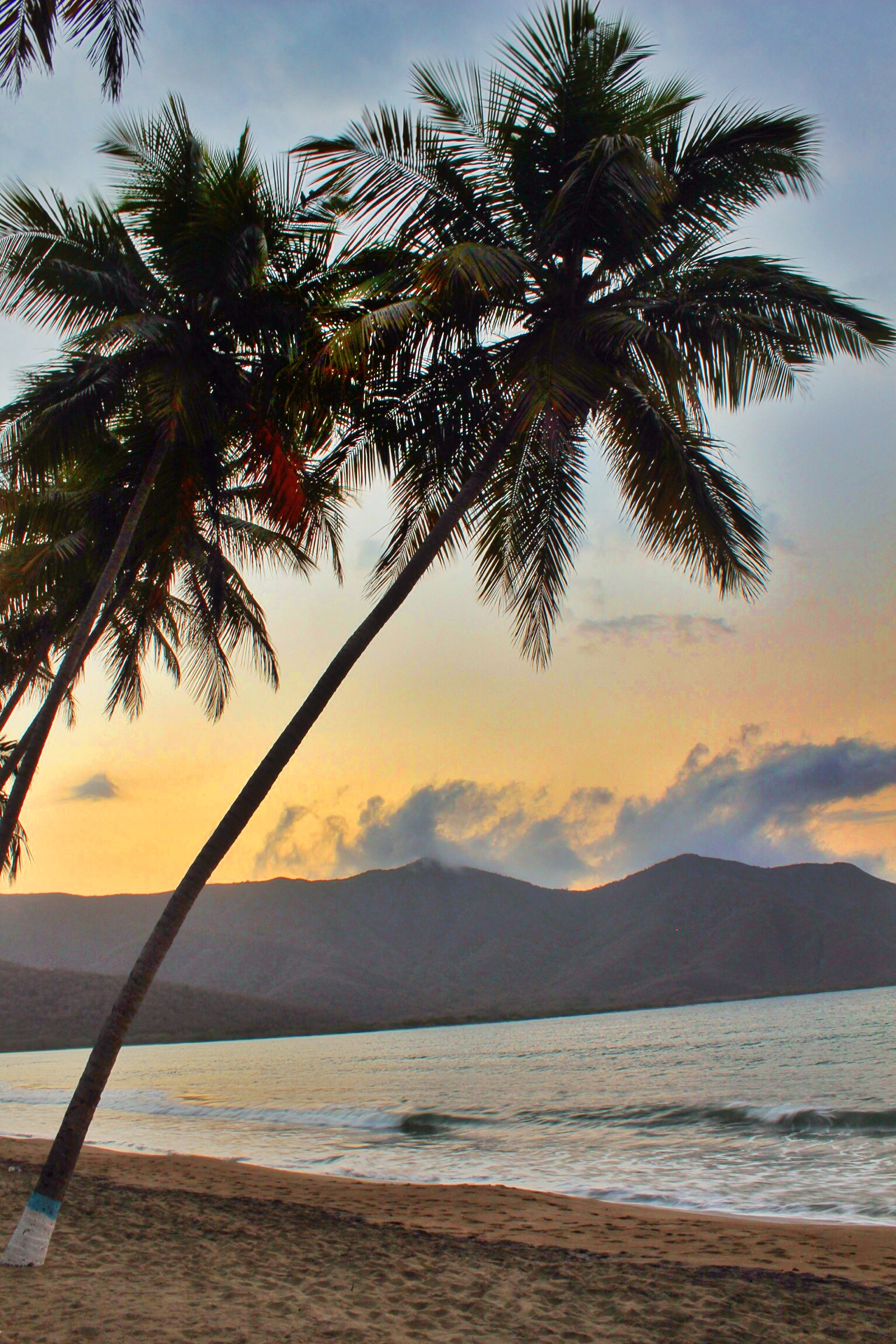 Atardecer en Turiamo / Ocumare Estado Aragua - Venezuela